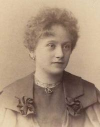 Turkish painter Mihri Müşfik Hanım (1886-1955)